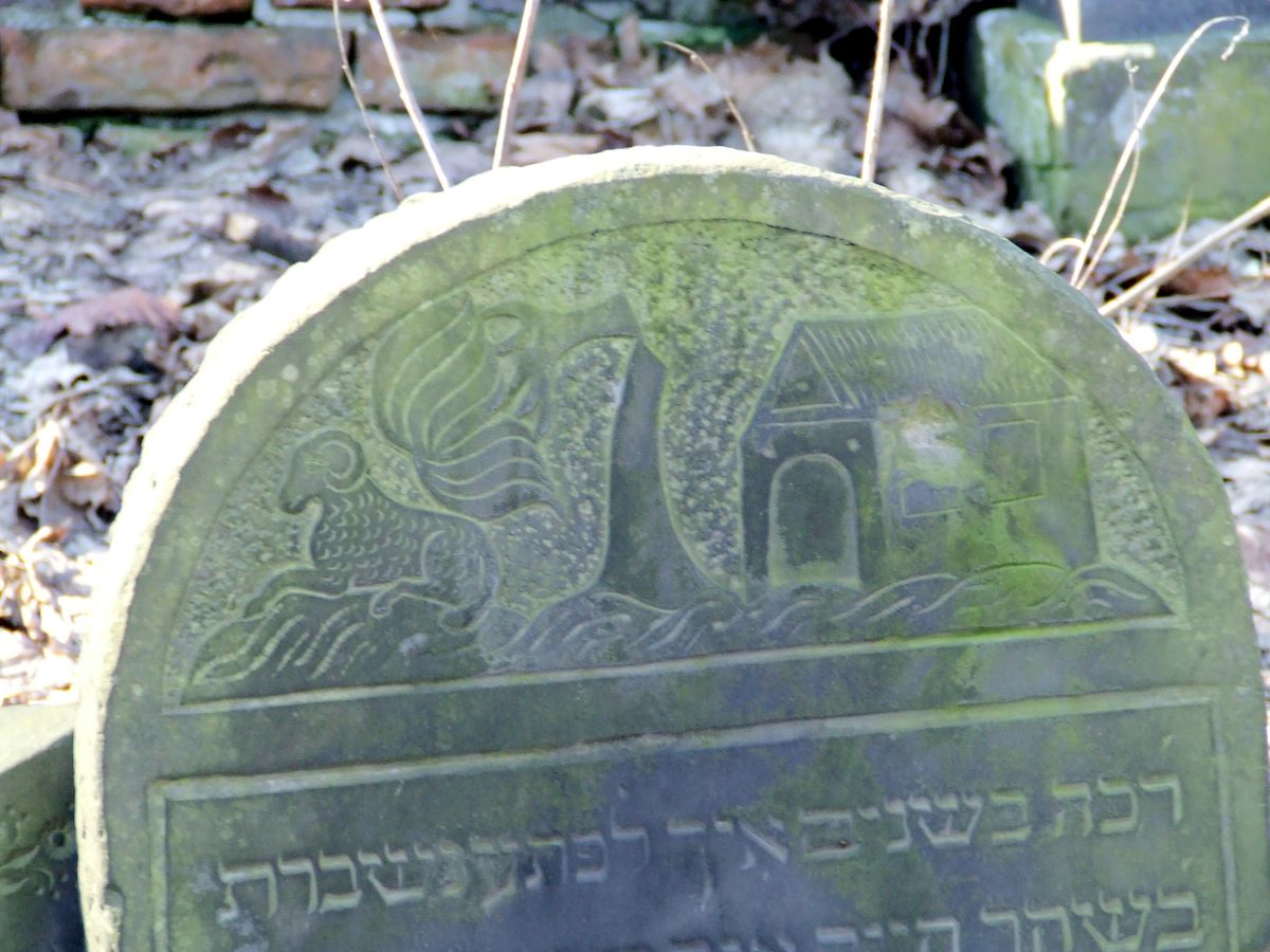 Symbolika